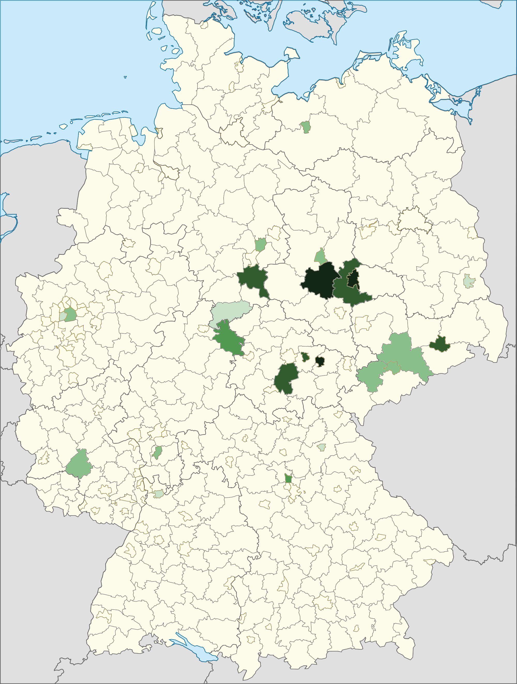 Karte der Personen mit chinesischer Staatsangehörigkeit und deren relativer Häufigkeit in den Landkreisen 2014. Dunkelgrün: häufigste ausländische Staatsangehörigkeit in diesem Kreis, hellgrün: fünfthäufigste ausländische Staatsangehörigkeit in diesem Kreis, weiß: sechsthäufig oder weniger. Quelle: Ausländerzentralregister, Stand 31. Dezember 2014. Saarland: keine Daten auf Kreisebene (dargestellt ist die Landesebene). Deutschlandweite relative Häufigkeit der ausländischen Staatsangehörigkeit VR China: Platz 20.